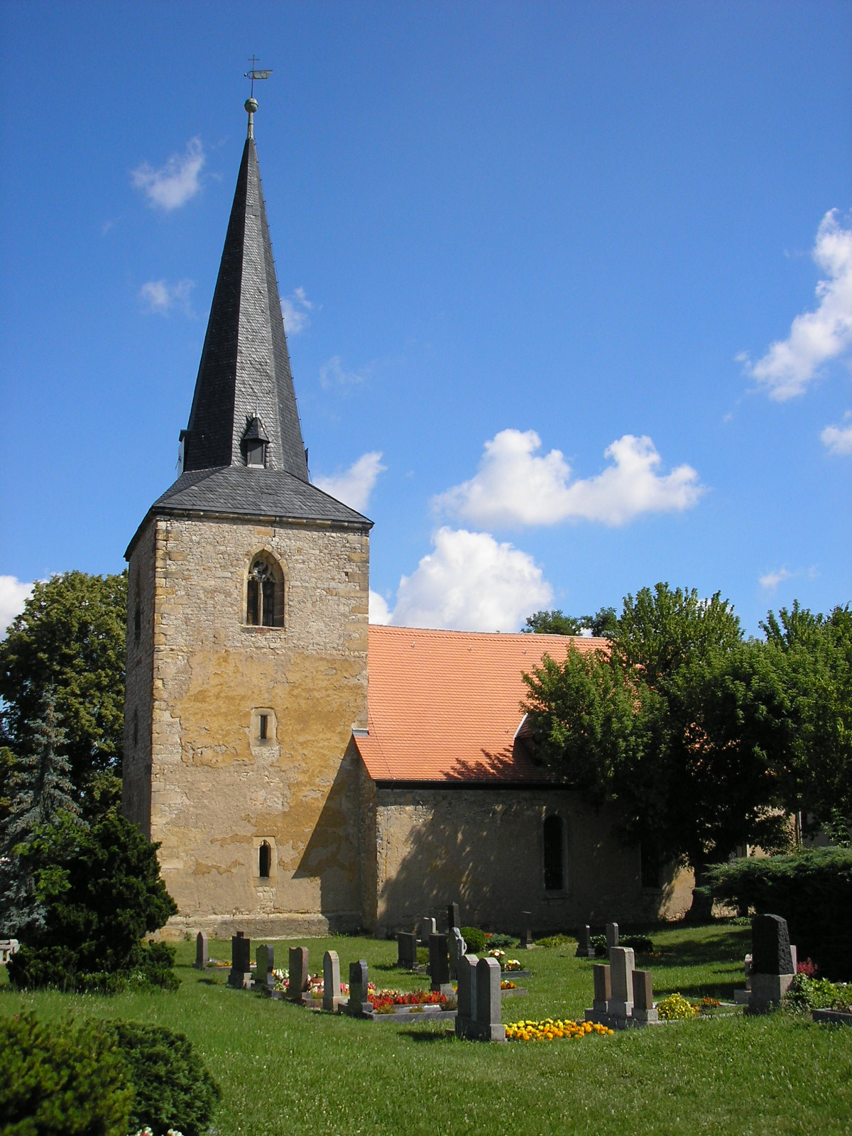 Die Dorfkirche von Schwerborn (Thüringen).